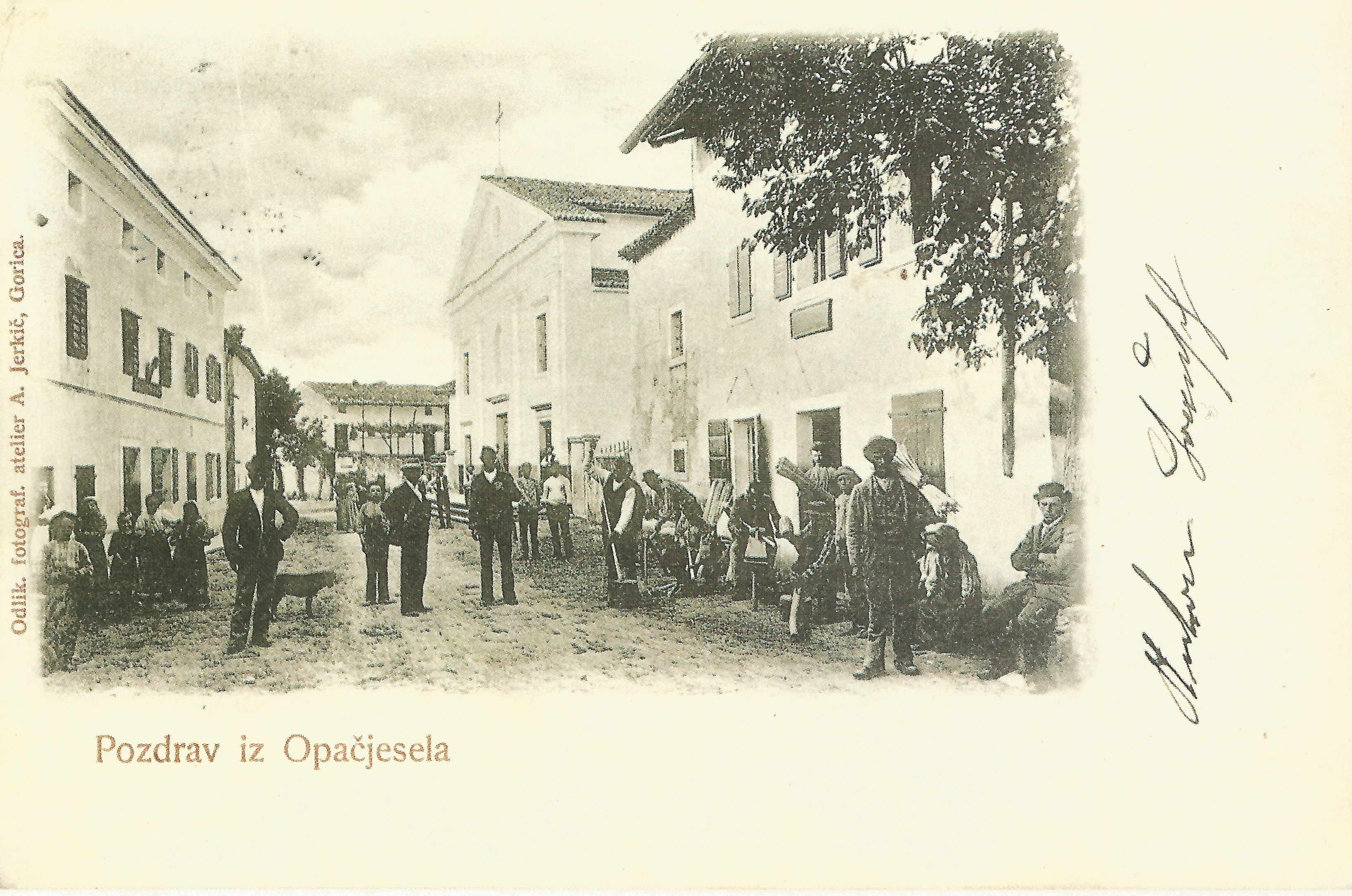 Razglednica Opatjega sela.